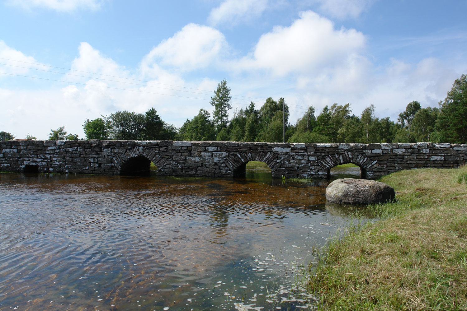 Frösslundabron auf Öland. Brücke über den Frösslundabach (Frösslundabäcken) bei Frösslunda.